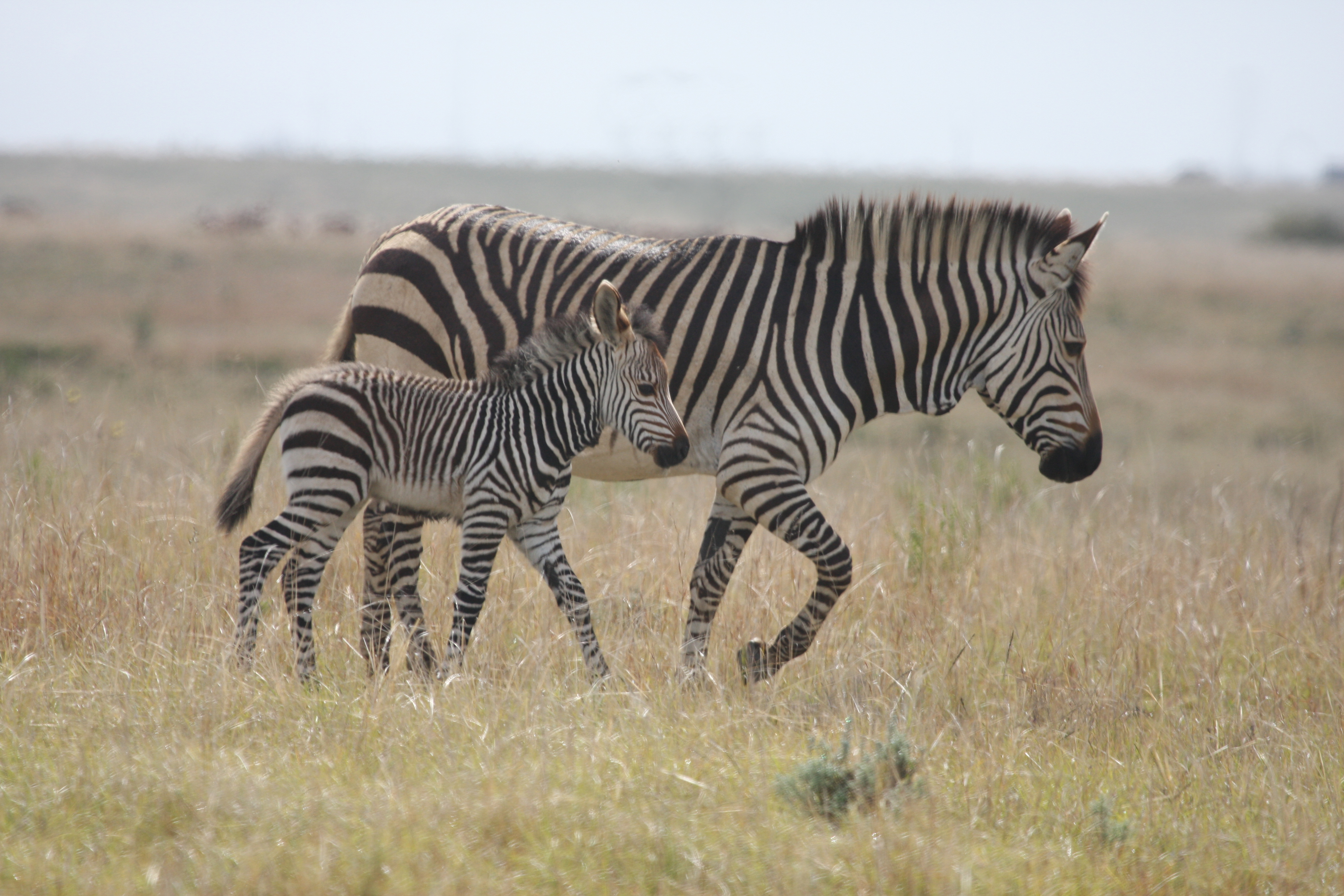 Zebra